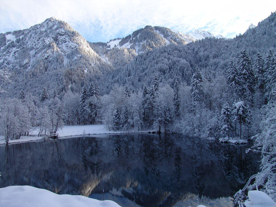 Der Christlessee bei Oberstdorf.